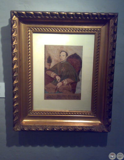 Retrato del Obispo Palacios (1868) realizado por Saturio Cándido Ríos.